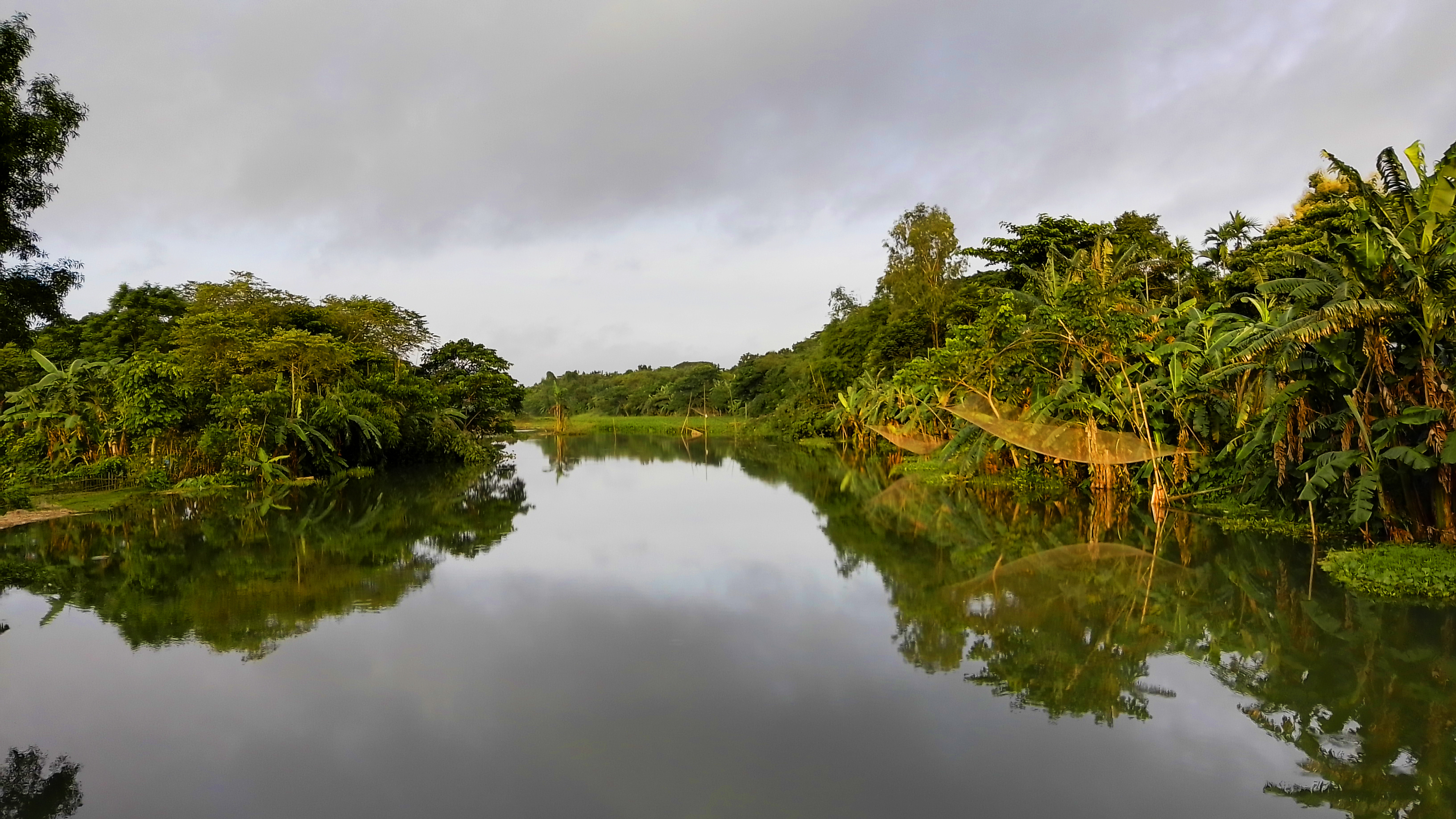 রঘুখালি ব্রিজ থেকে তোলা নরসুন্দা নদীর ছবি।